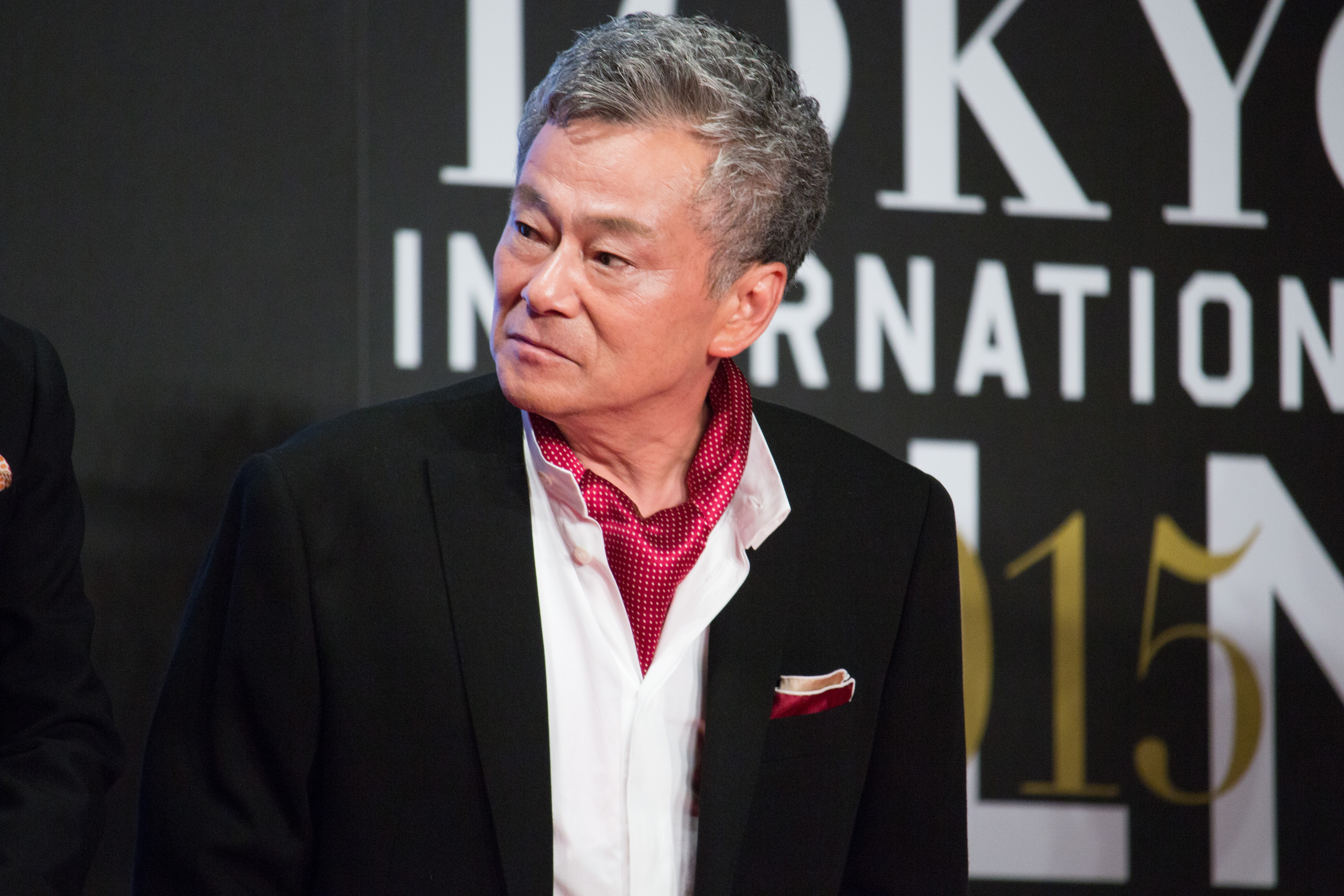 第28回 東京国際映画祭 オープニングセレモニー 池田秀一 (ガンダムとその世界)